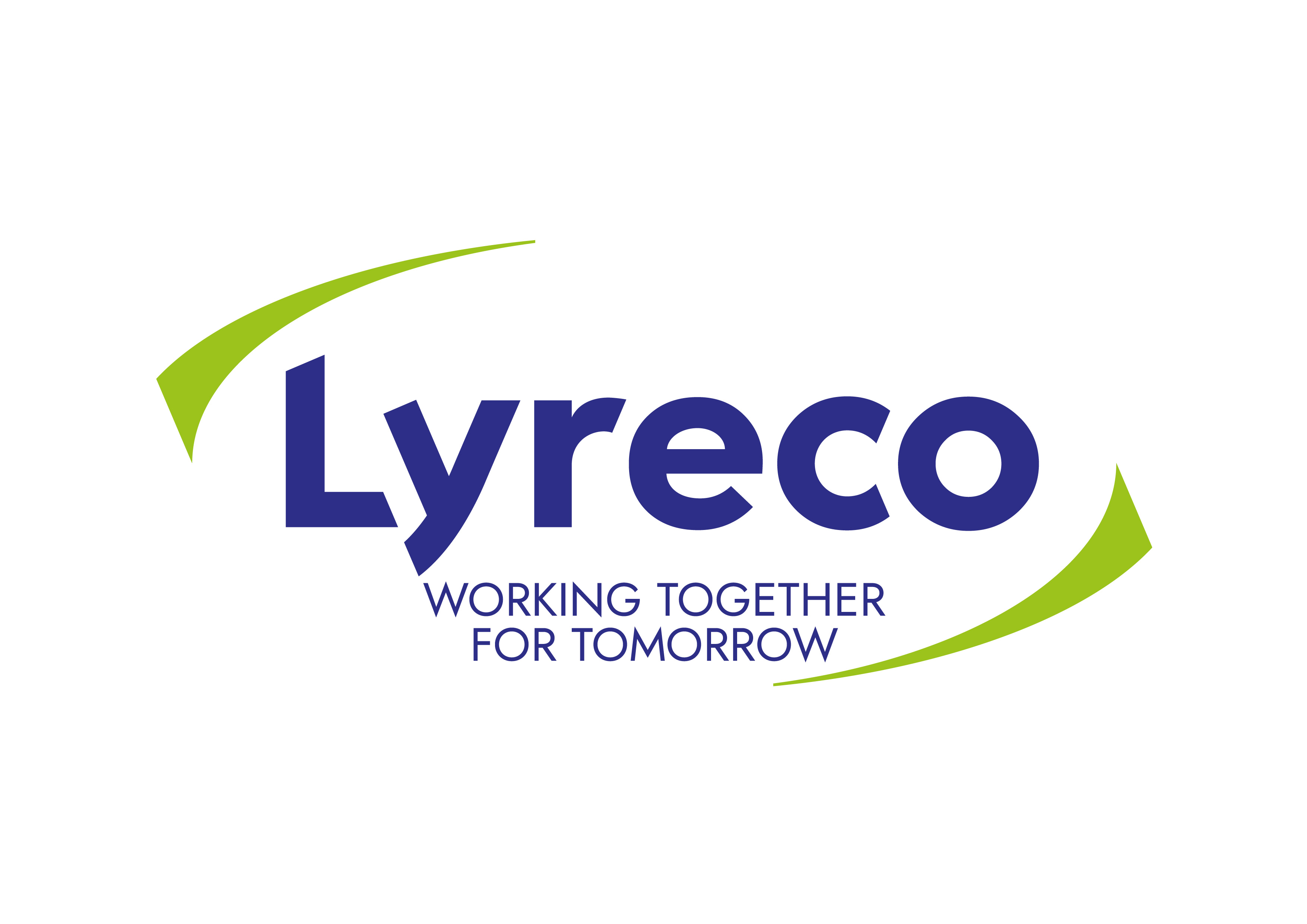 Logo de la société Lyreco.